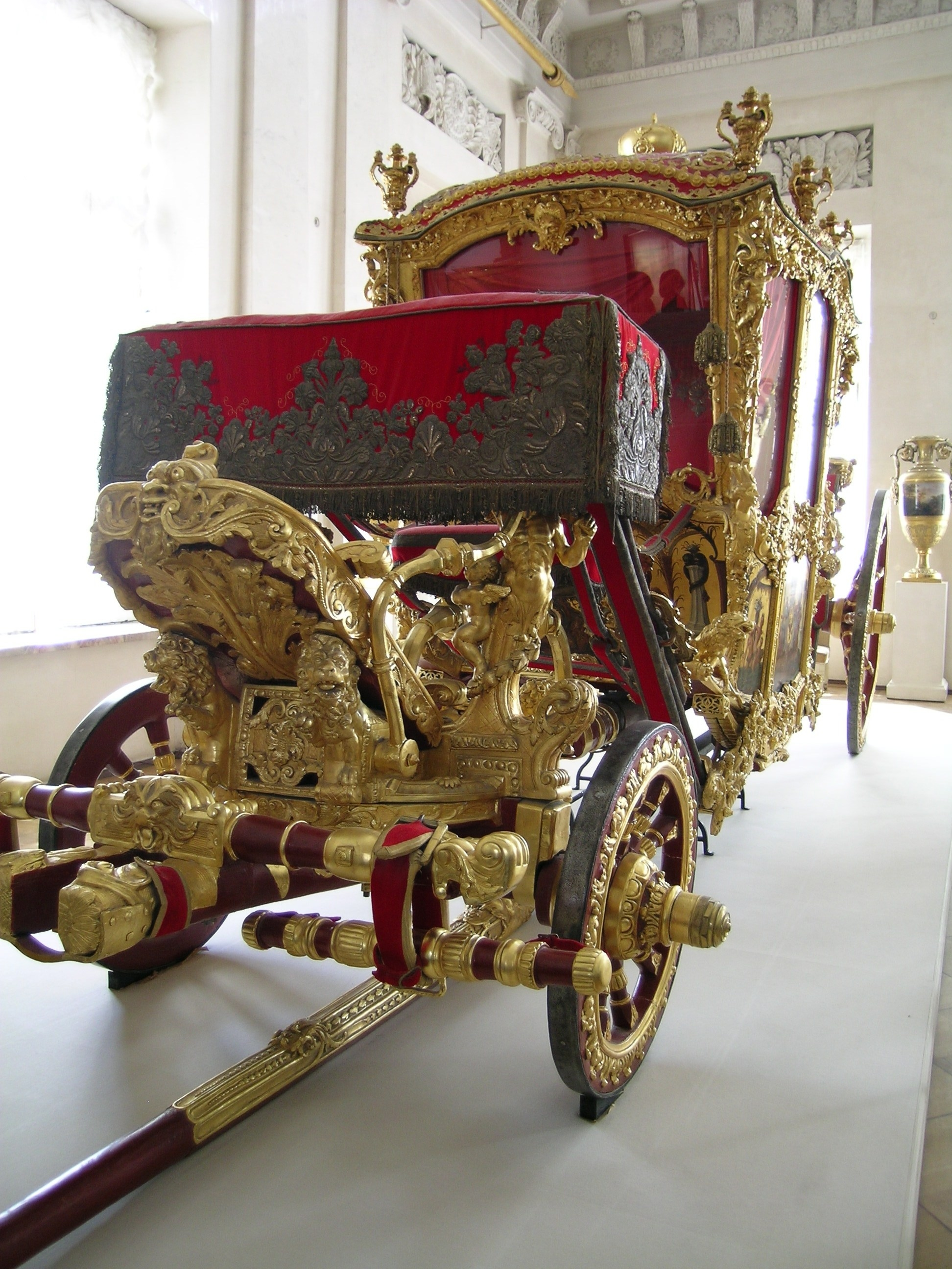 königliche Kutsche d. Katharina II (Eremitage St.Petersburg)